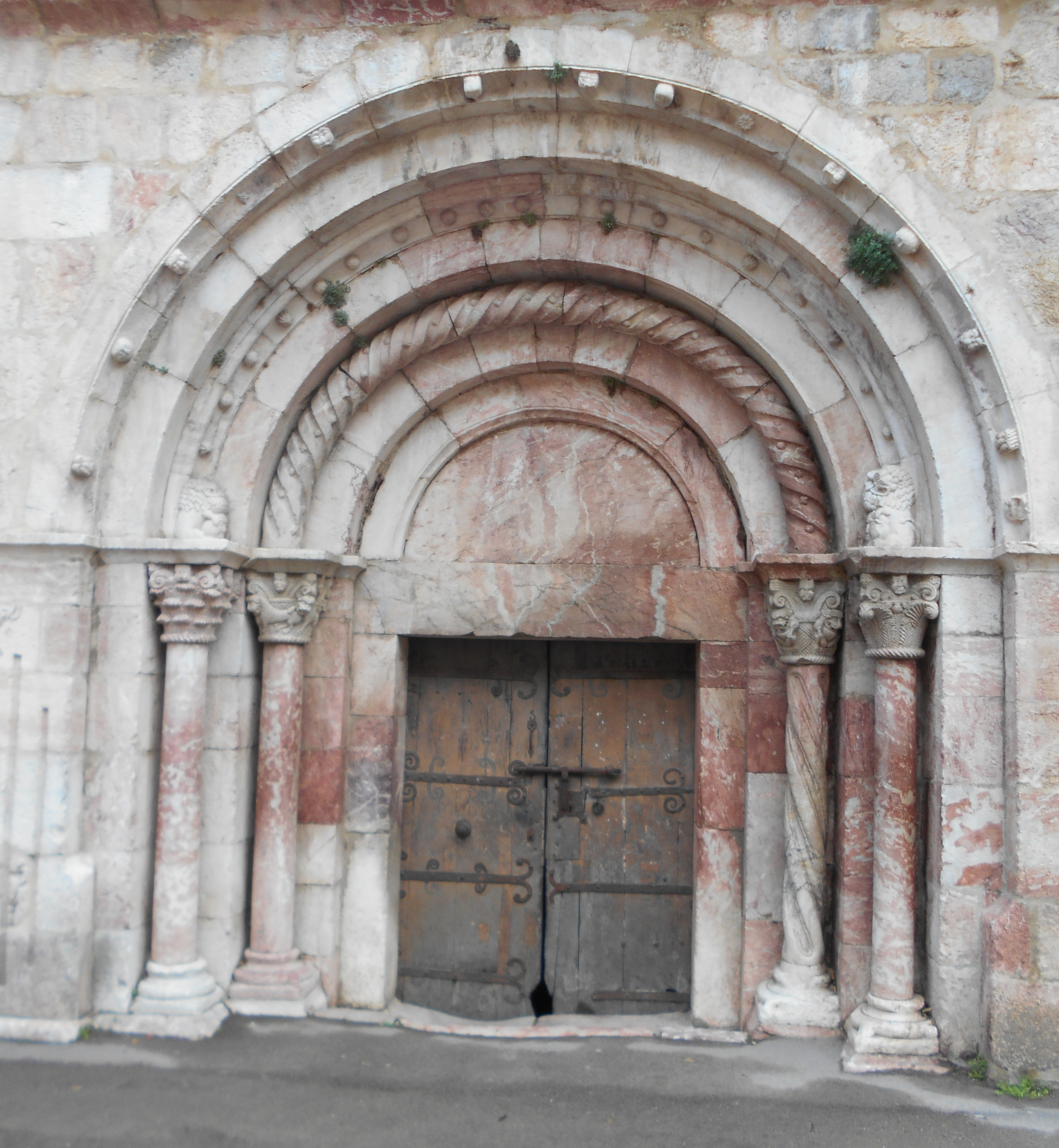 Portalada principal de Sant Jaume de Vilafranca de Conflent